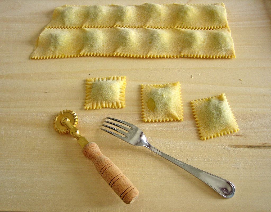 tagliati e rifiniti con la forchetta ricetta/recipe sul mio Blog